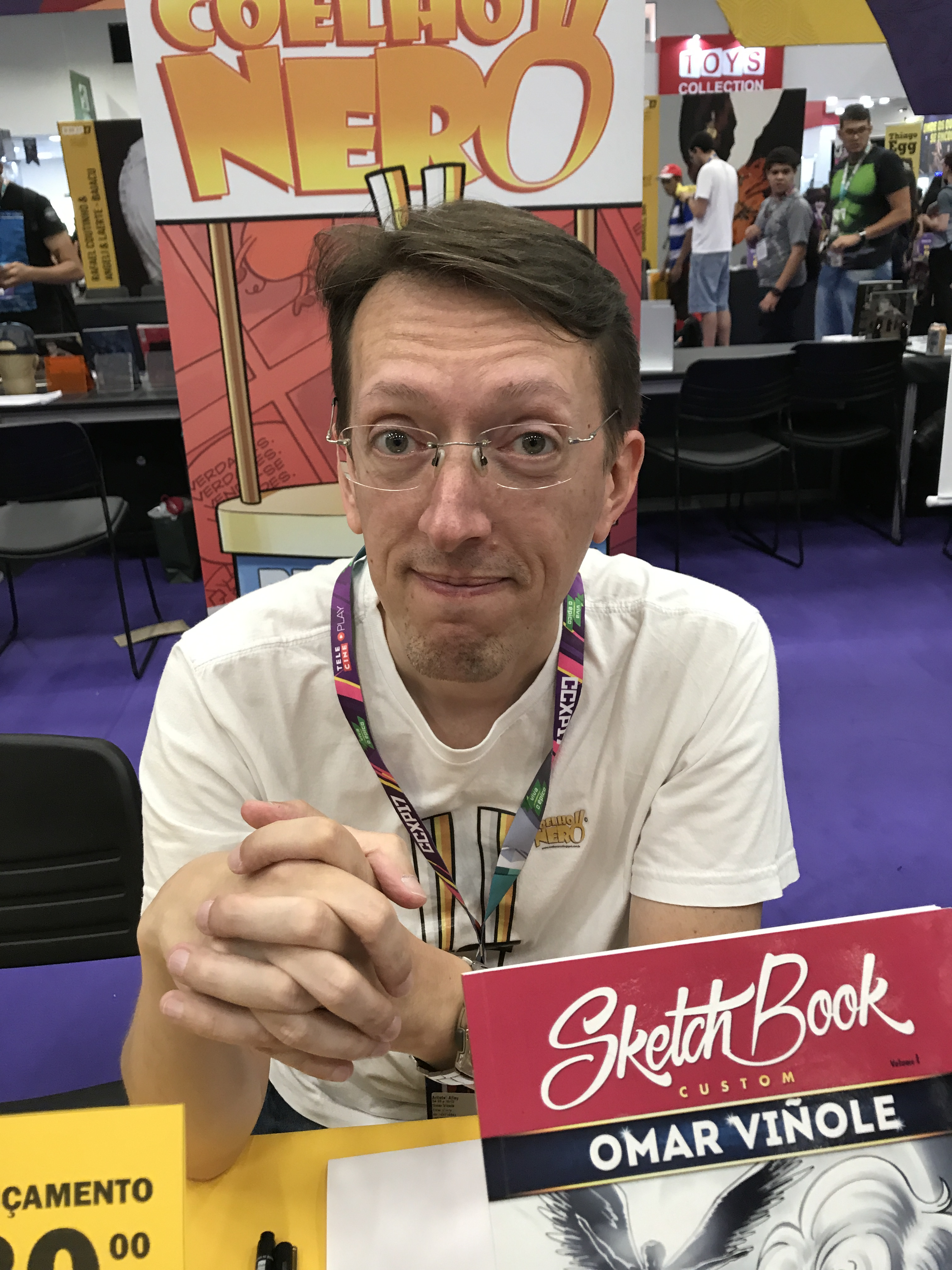 Artista Omar Viñole na edição de 2017 da Comic Con Experience